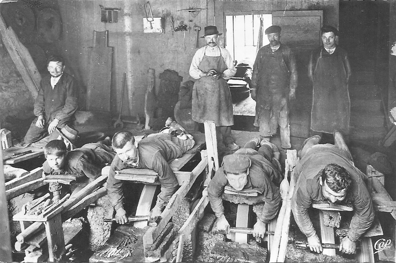 Condition de travail des émouleurs dans une coutellerie de Thiers